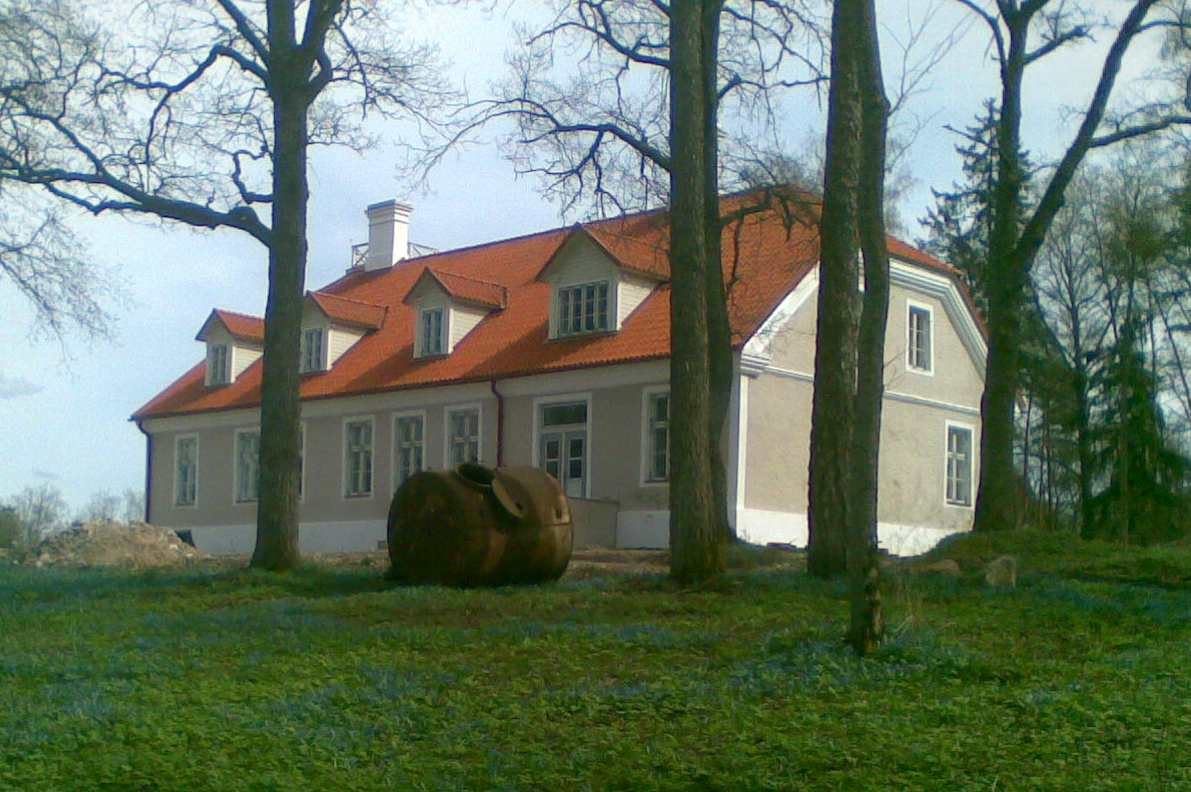 Kunagise Röa mõisa peahoone.